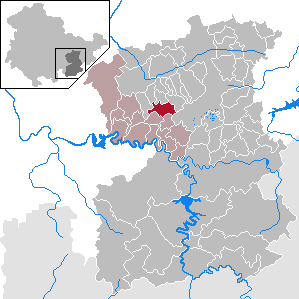 Peuschen in Thuringia - Saale-Orla-Kreis